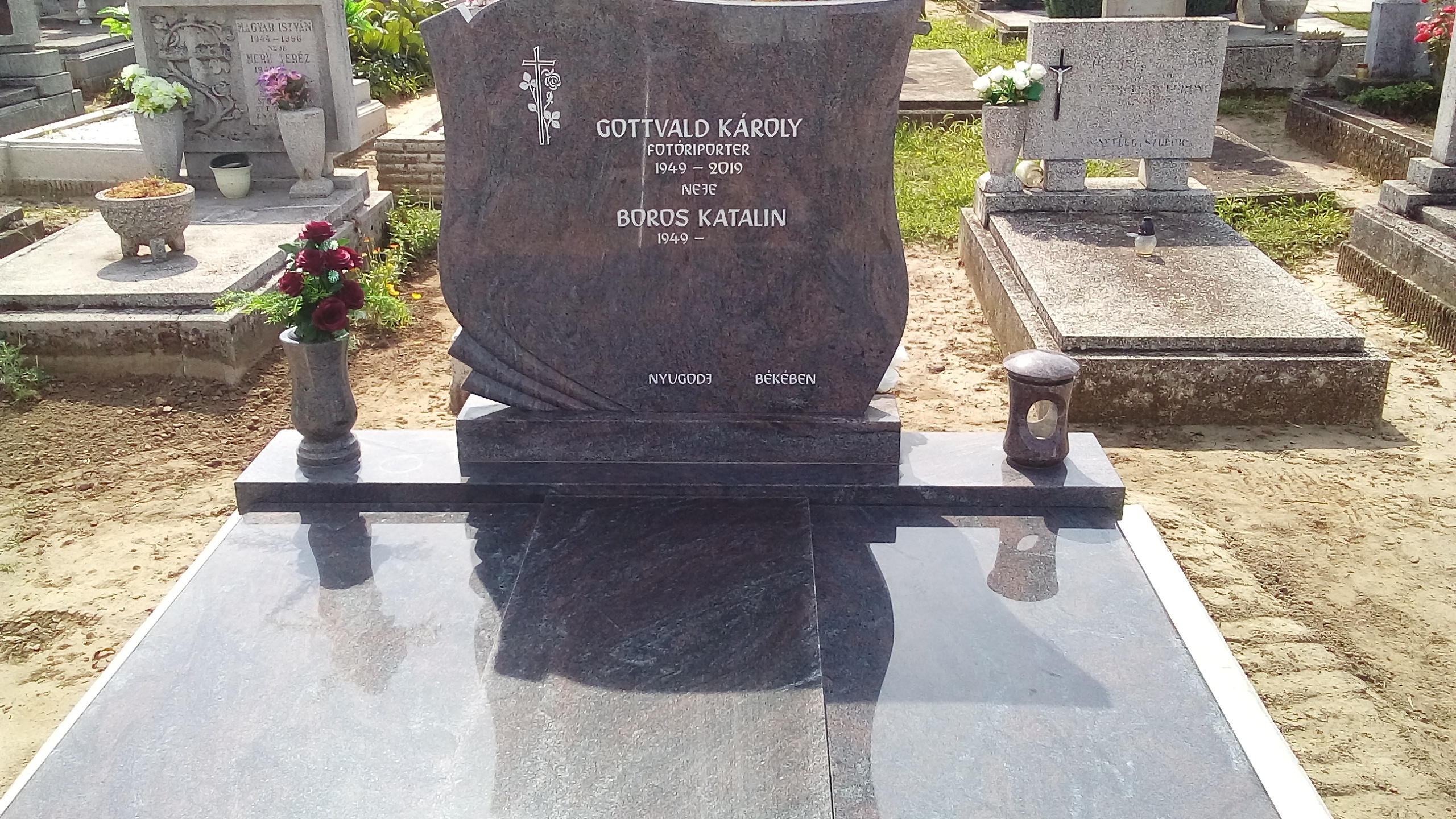 Gottvald Károly fotóriporter (Tolna, 1949. január 7. - Szekszárd, 2019. július 6.) sírja, Tolna temetője, A parcella, 18. sor, 14. sír